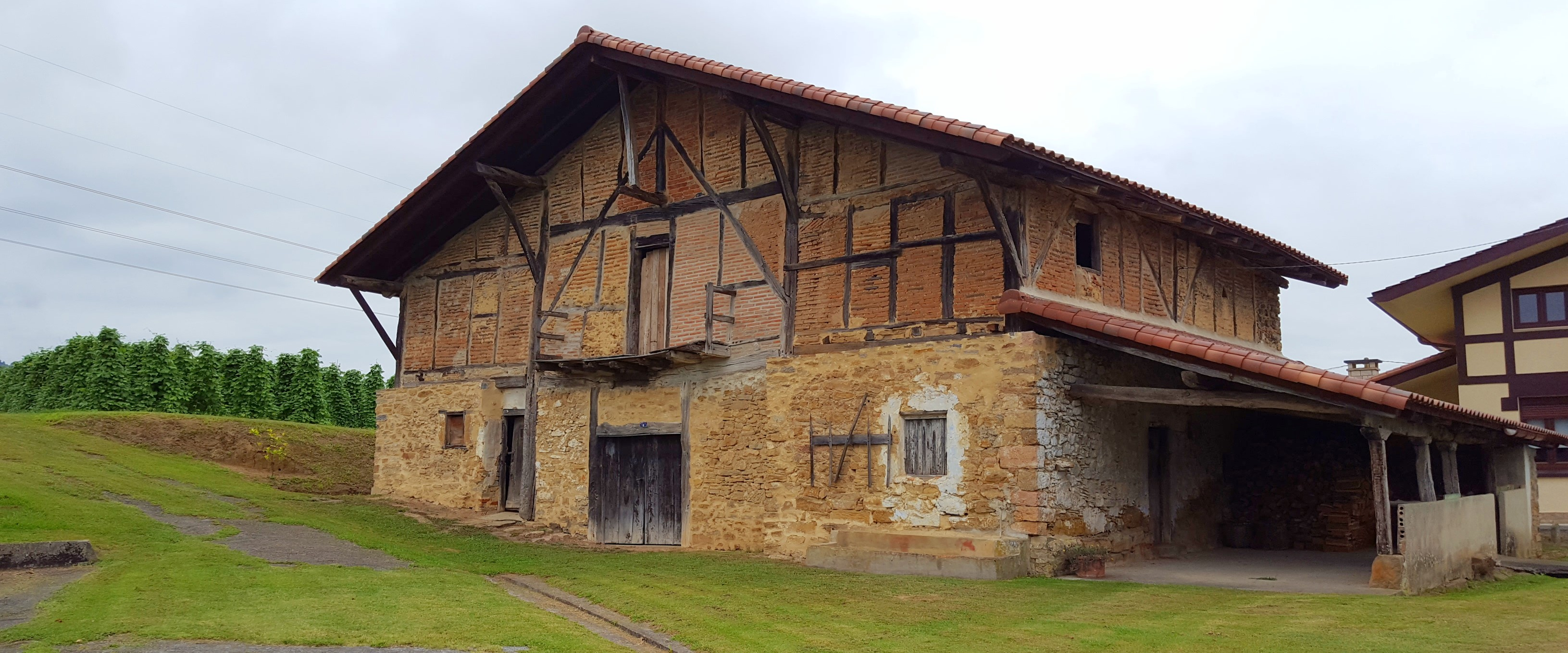 Gamizeko Errementari baserria Olagorta auzoan